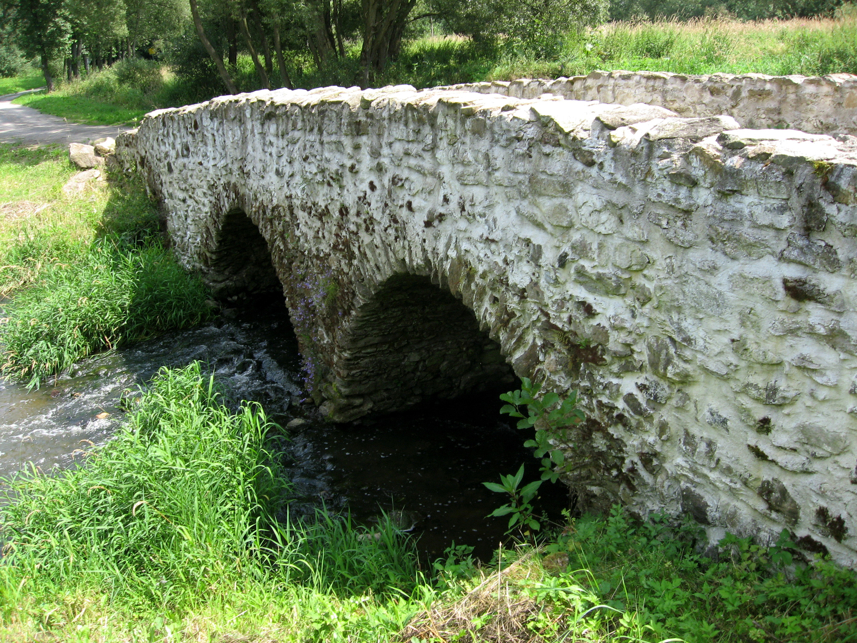 U Lutriána, někdy též zvaný Za Lutriánem, je tříobloukový středověký kamenný most přes říčku Šlapanku